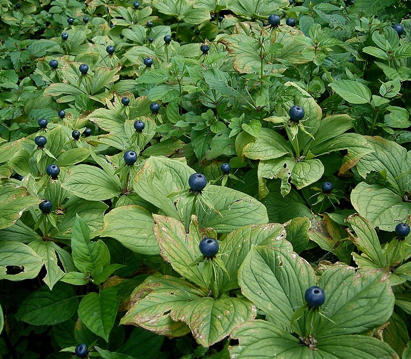 Paris quadrifolia